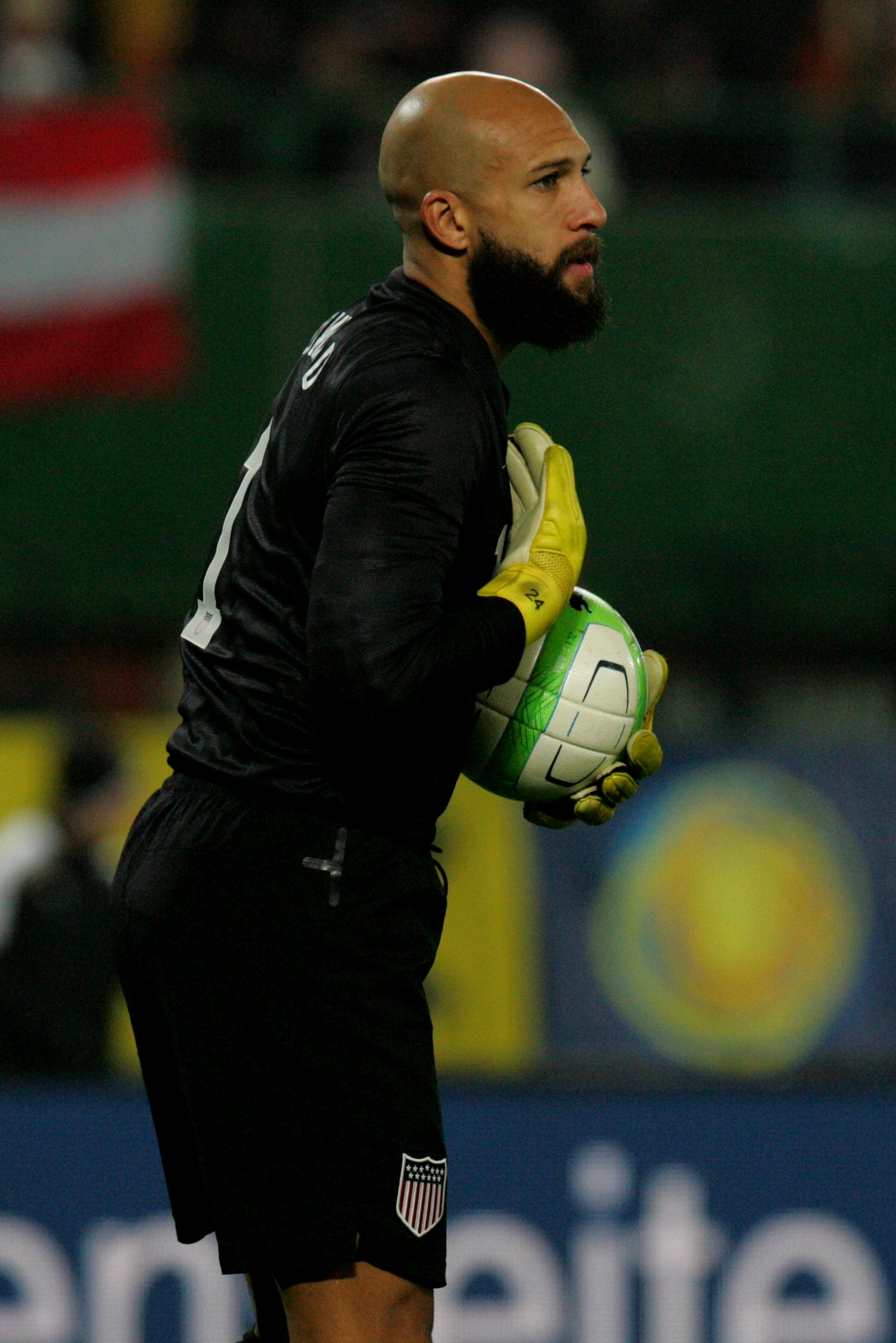 Freundschaftliches Länderspiel Österreich - USA 19.11.2013 in Wien: Tim Howard